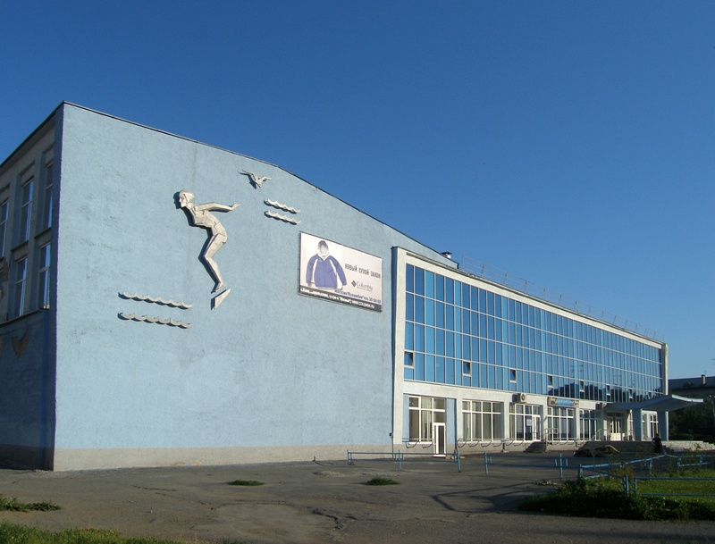 SinTZ Palace of Sport in Kamensk-Uralsky